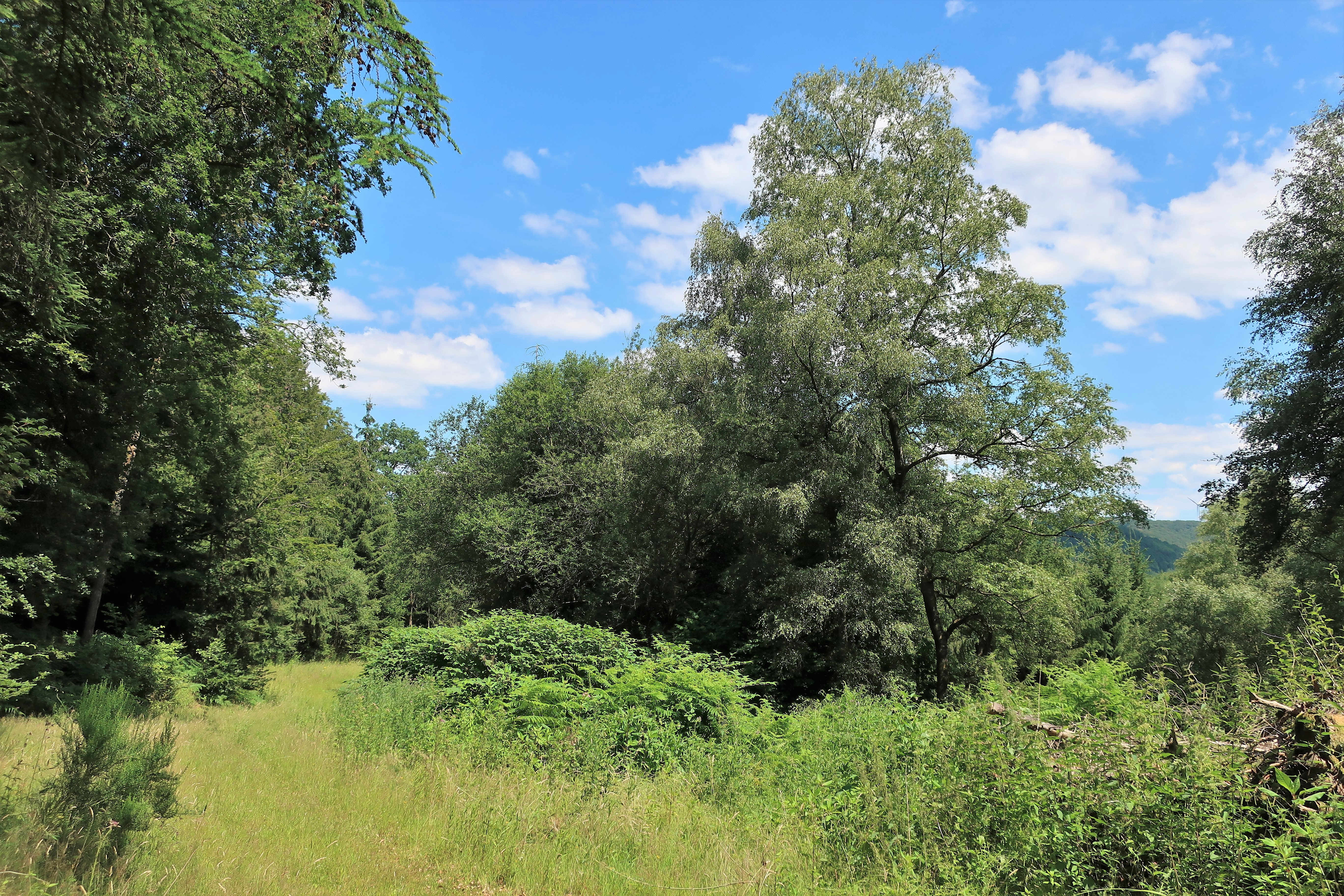 Geschützter Landschaftsbestandteil 1.4.2.91 „Mönigfeld“ in Hagen, westlich der B 54 südlich von Rummenohl. Es handelt sich um feucht-sumpfiges Grünland, Auwaldfragmente und naturnahe Laubwaldbestände auf dem westlich anschließenden Berghang. Im Wald liegen weiterhin ein krautreicher Hohlweg, ein Quellbereich und ein naturnaher Bachsiepen.